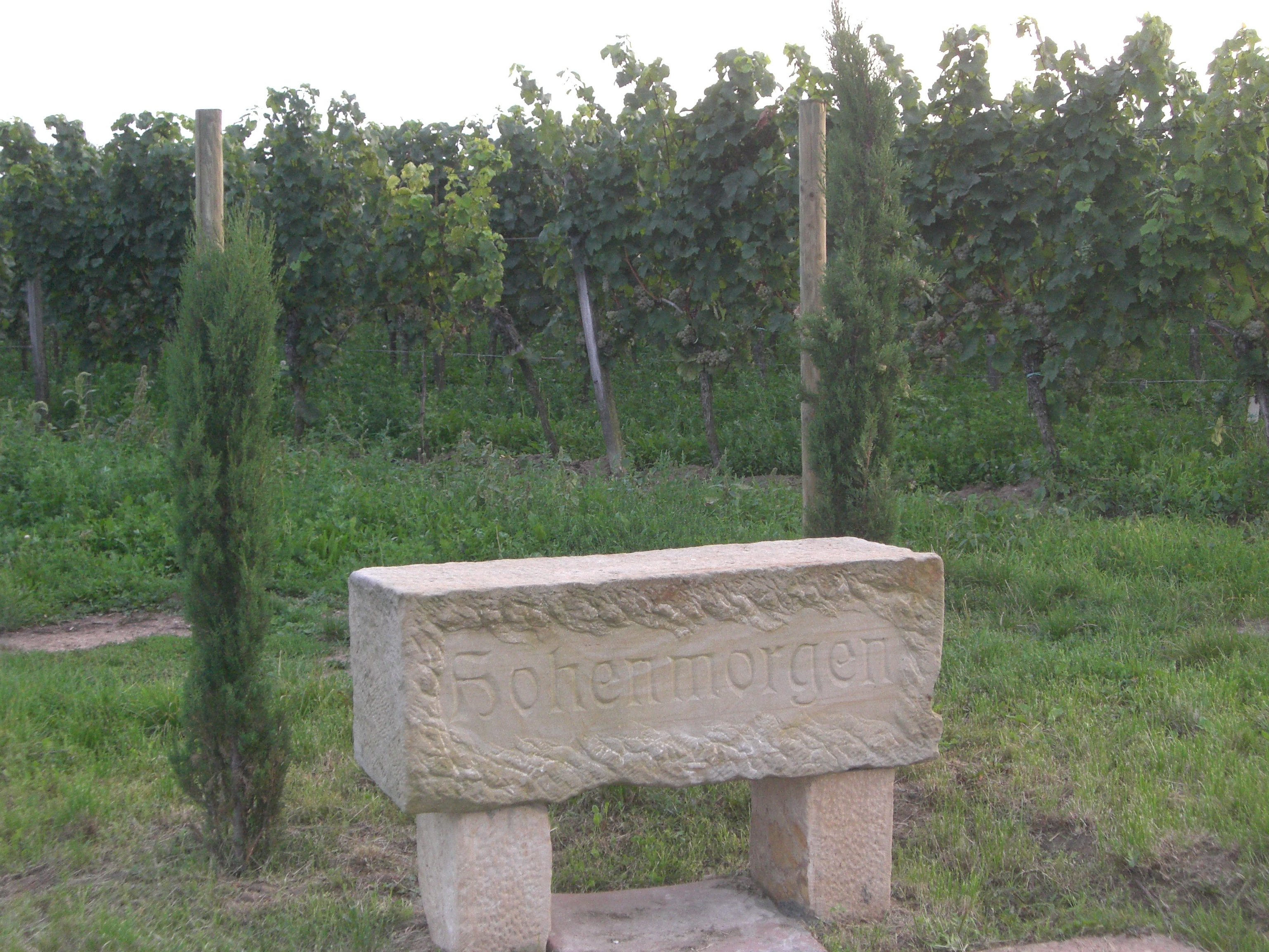 Blick auf einen Wingert der Deidesheimer Weinlage Hohenmorgen